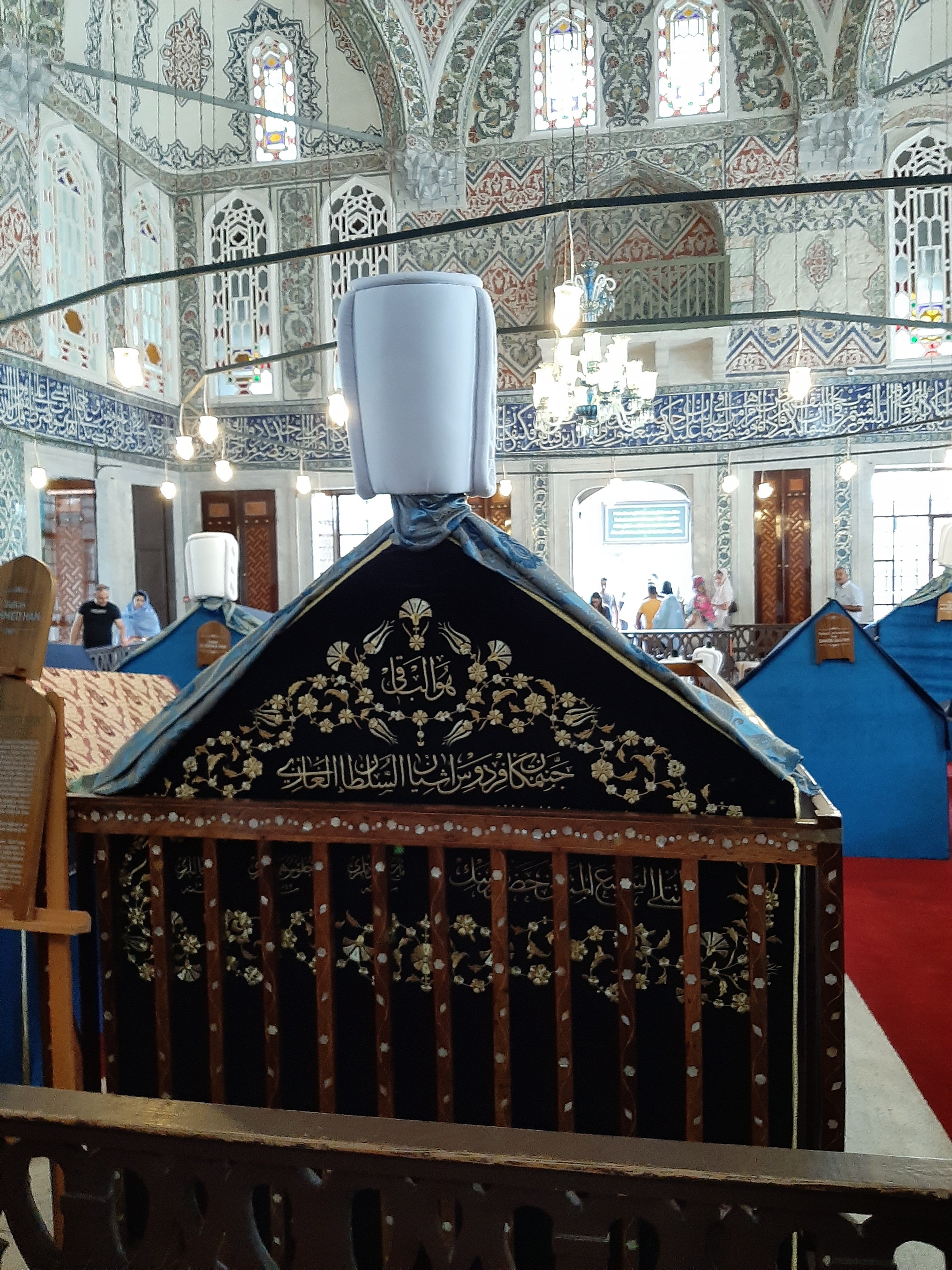 Todesstätte von Sultan Ahmed